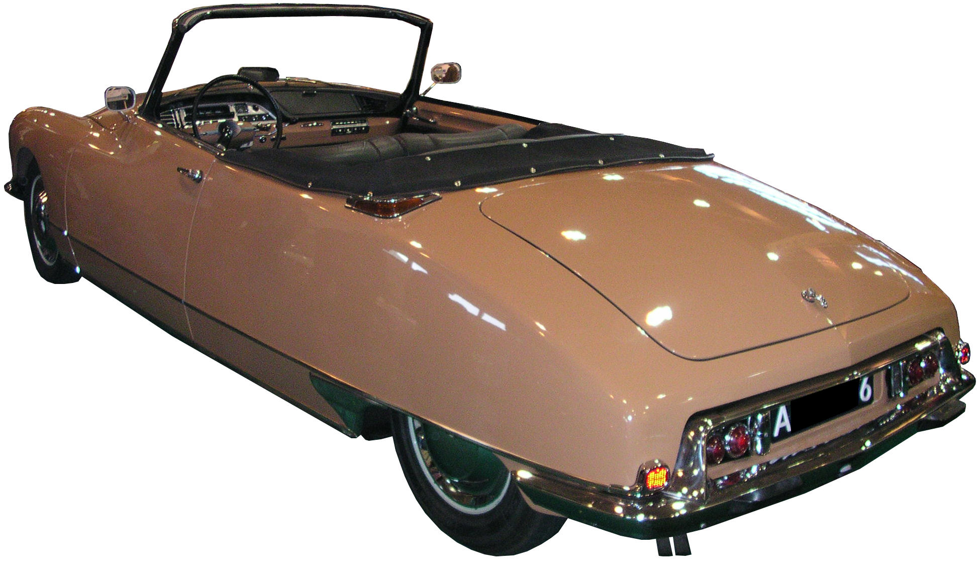 Essen, Technoclassica 2005. Citroën DS Cabrio